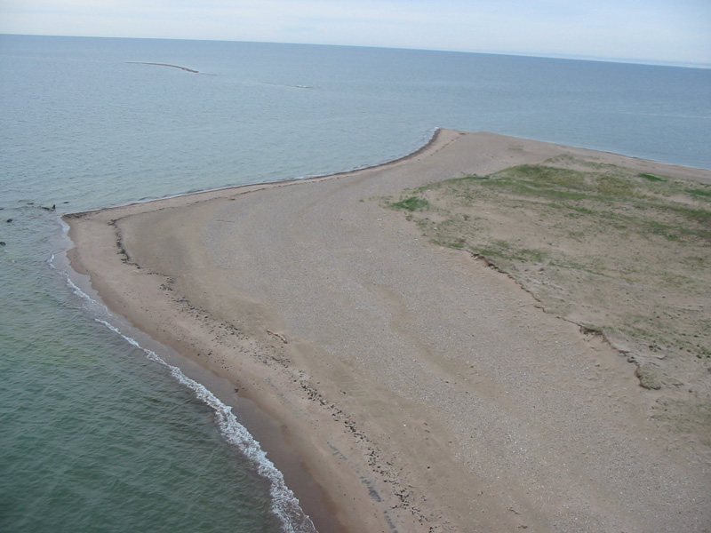 Pilt on tehtud Kiipsaare tuletornist.